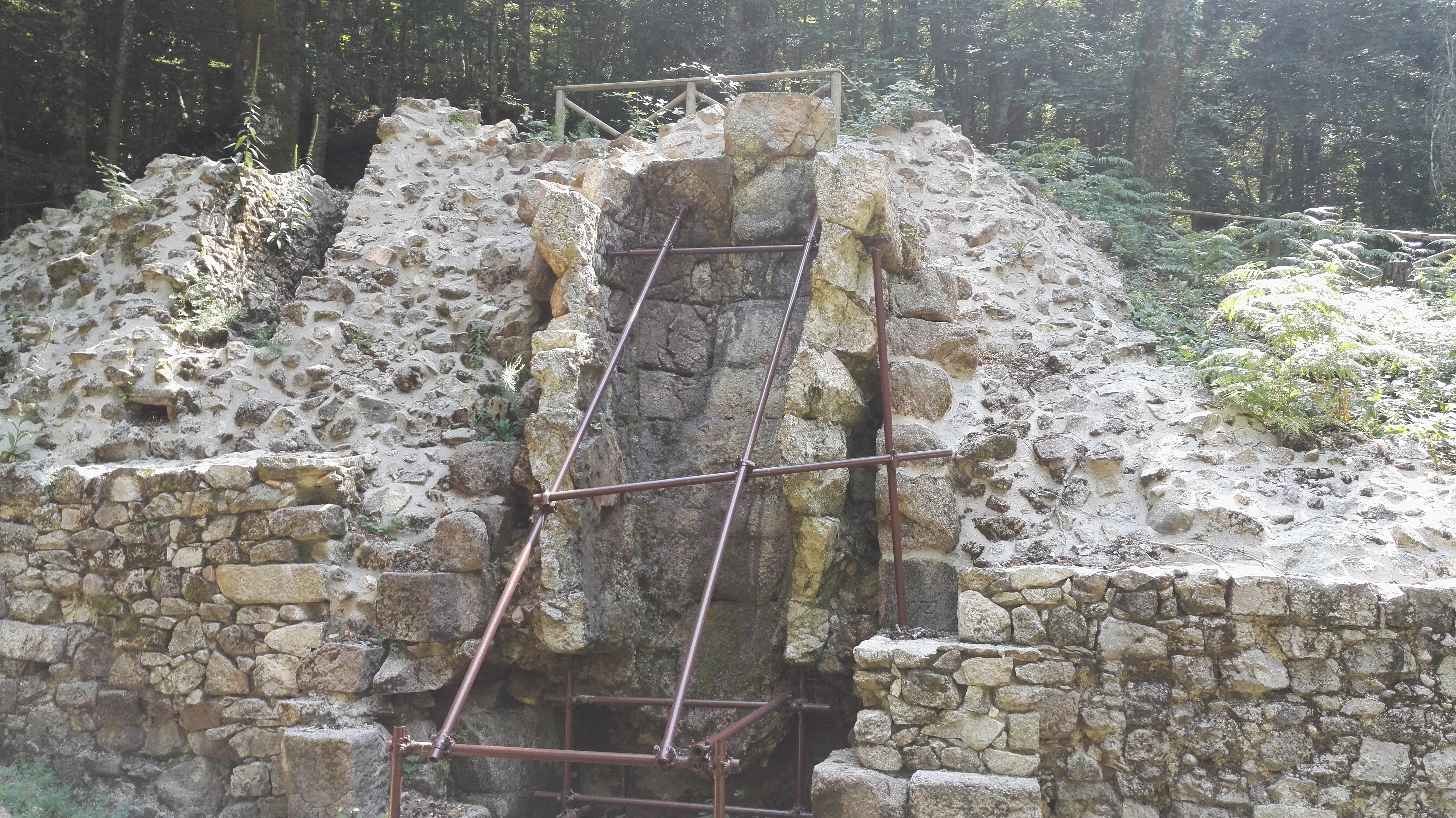 Parco siderurgico di Chiesa Vecchia (Ferdinandea) - Settore produttivo fornace